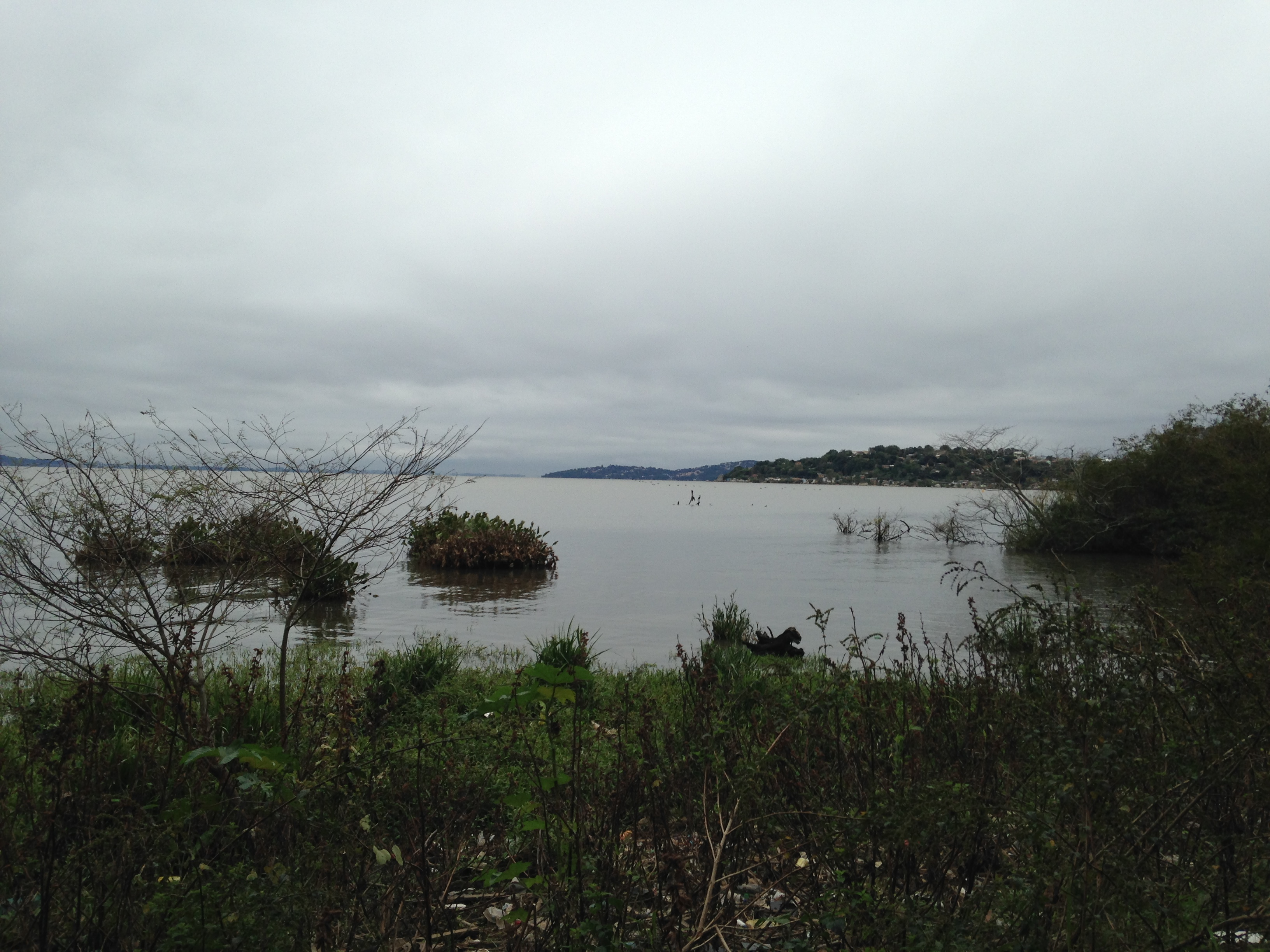 Foz do Arroio do Salso, no Bairro Ponta Grossa, mostrando a Vila dos Sargentos (Bairro Serraria) ao fundo.